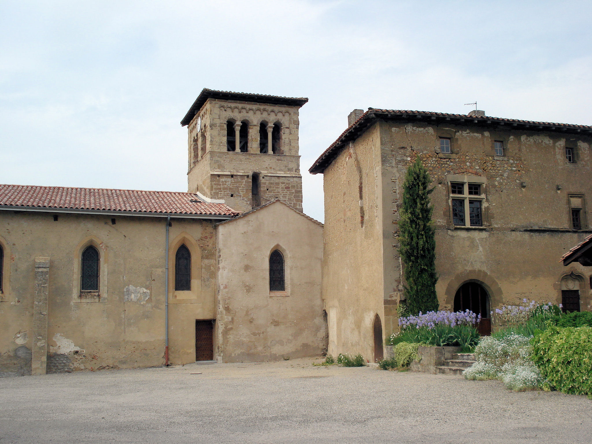 prieuré de Manthes dans la Drôme